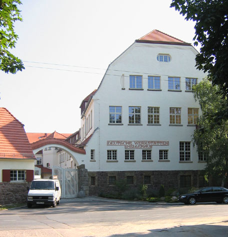 Deutsche werkstätten Hellerau arch Riemerschmid